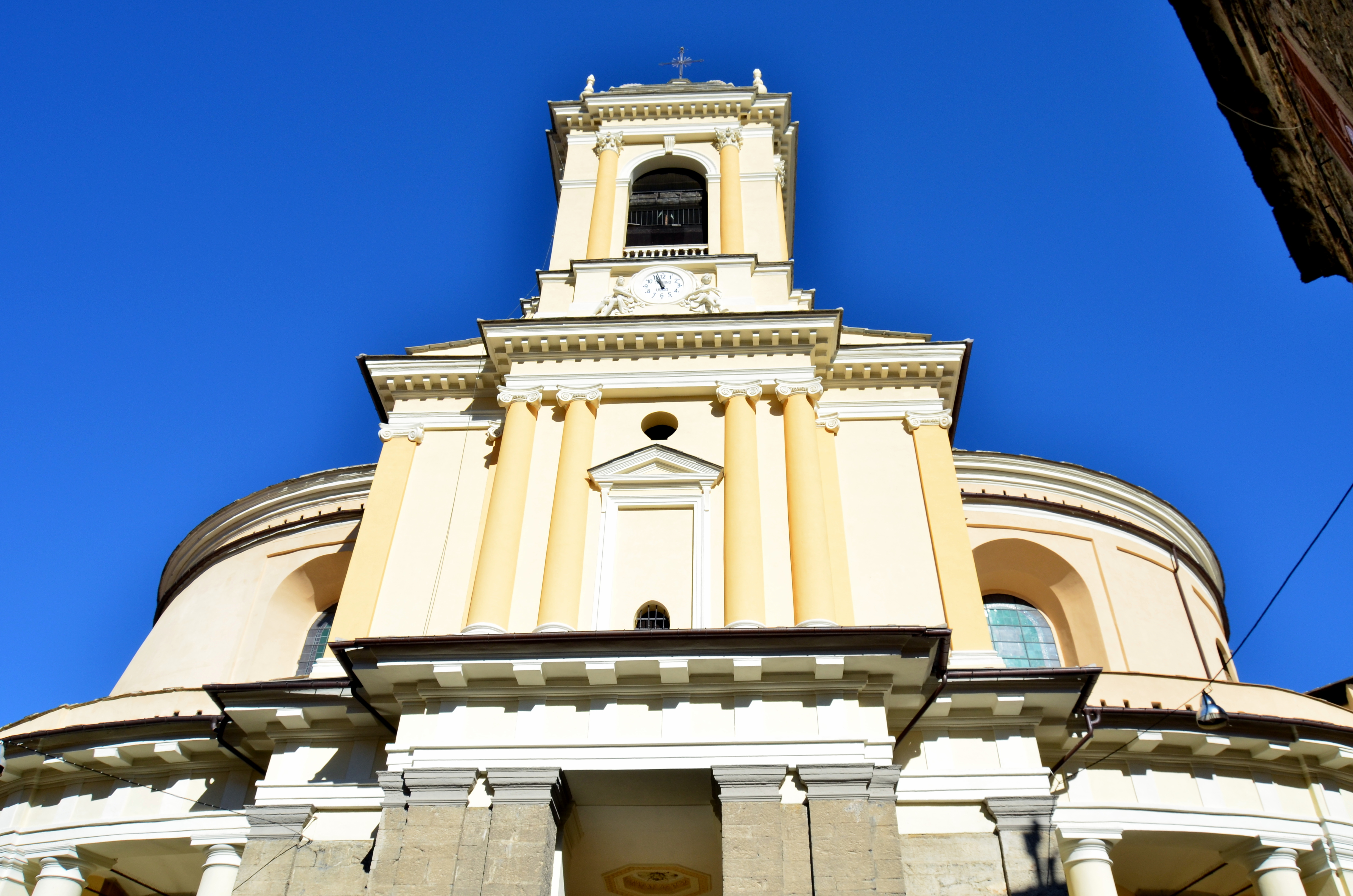 La collegiata di San Giovanni Battista, Pieve di Teco, Liguria, Italia